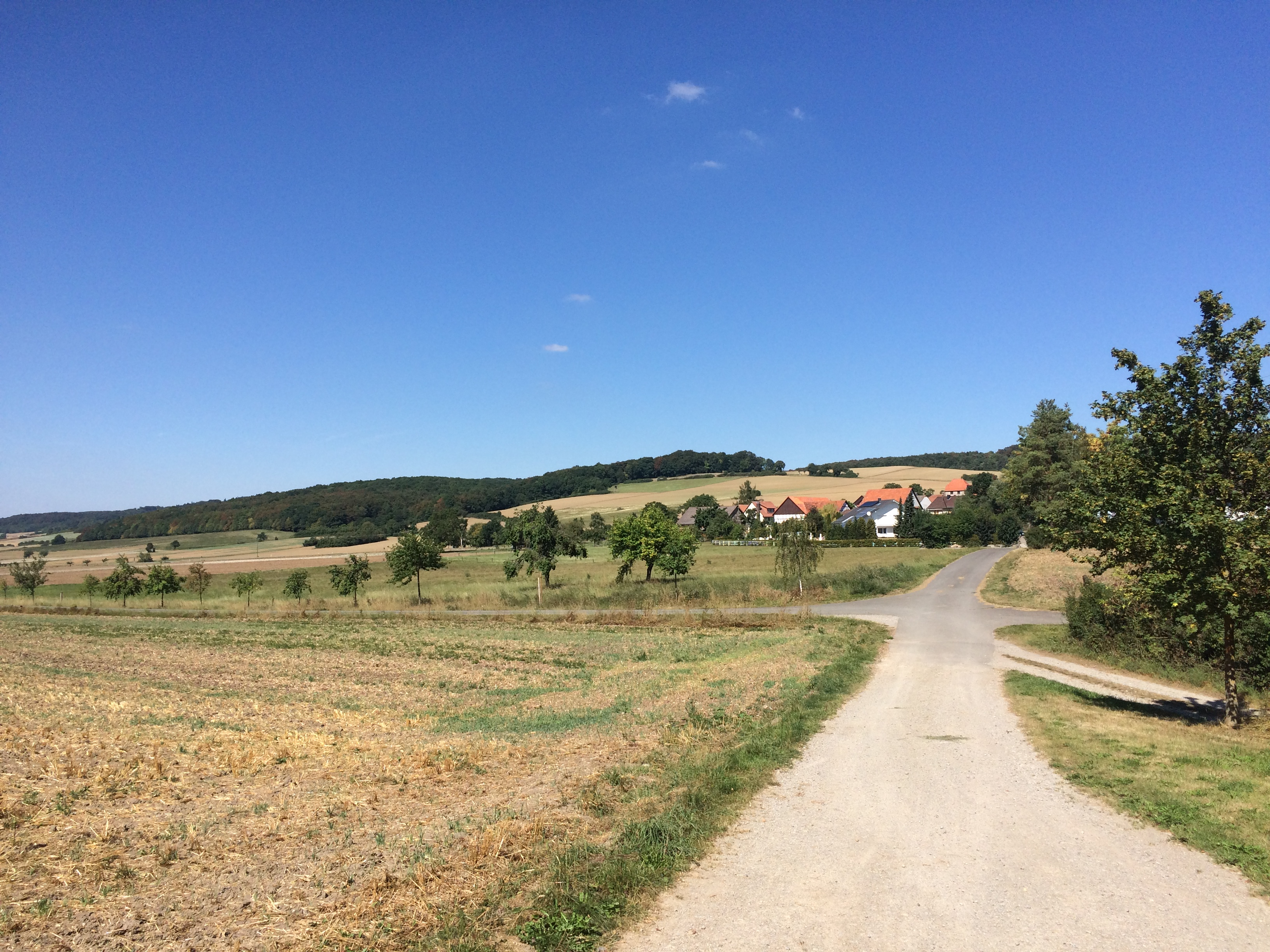 Der Werra-Burgen-Steig Hessen (X5H) zwischen Lüderbach (Ringgau) und Rittmannshausen (Ringgau) am Grillplatz? mit Blick auf Rittmannshausen